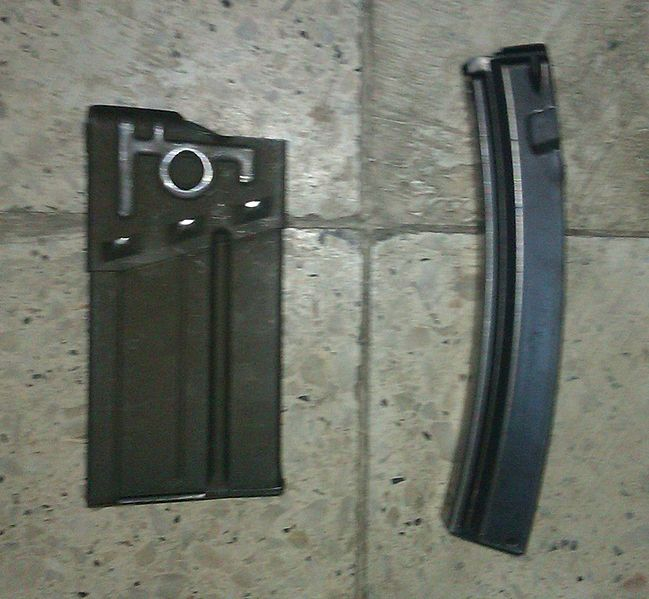 MP5 ve G3 Şarjörleri